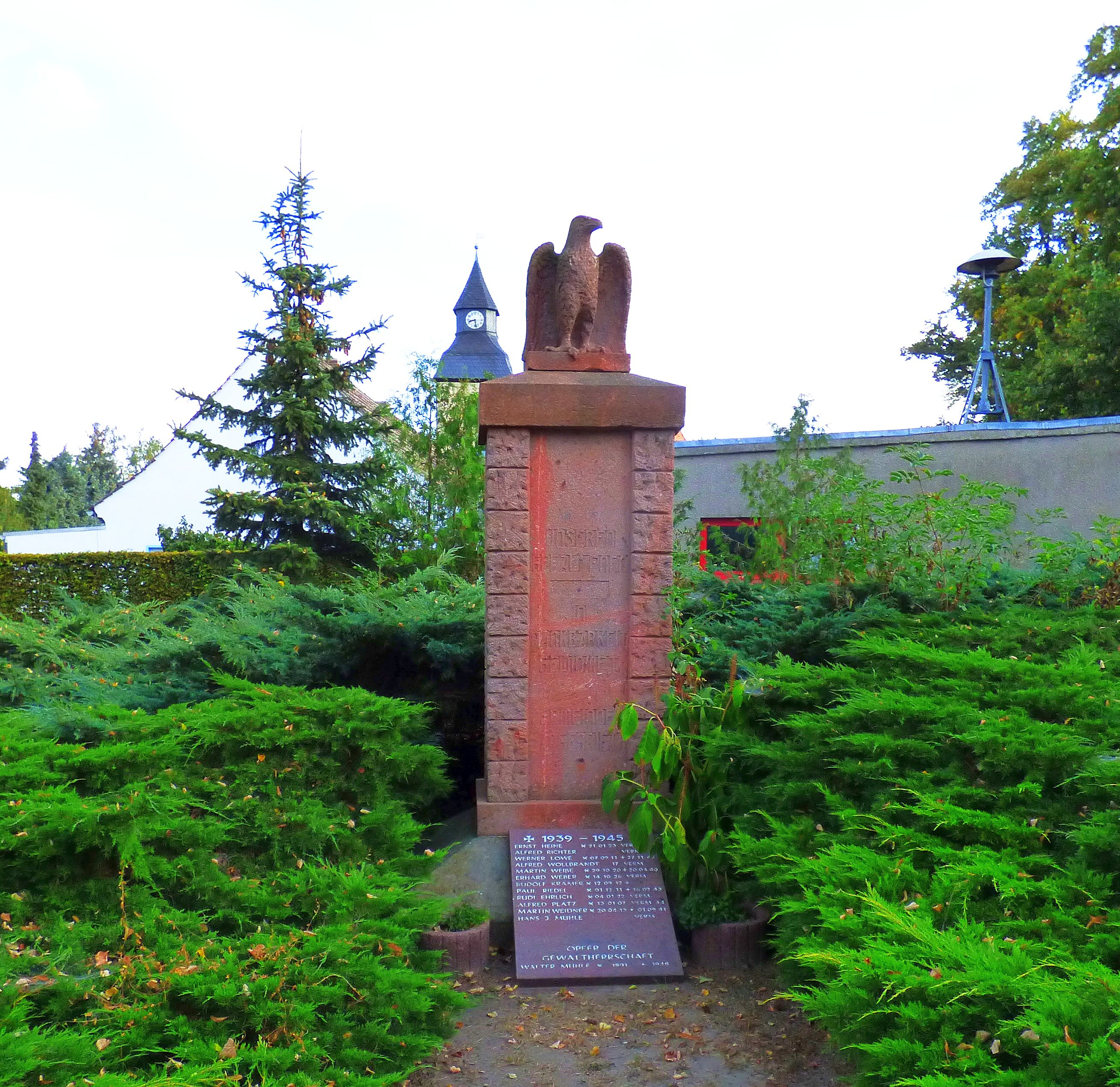 Kriegerdenkmal Langenrieth